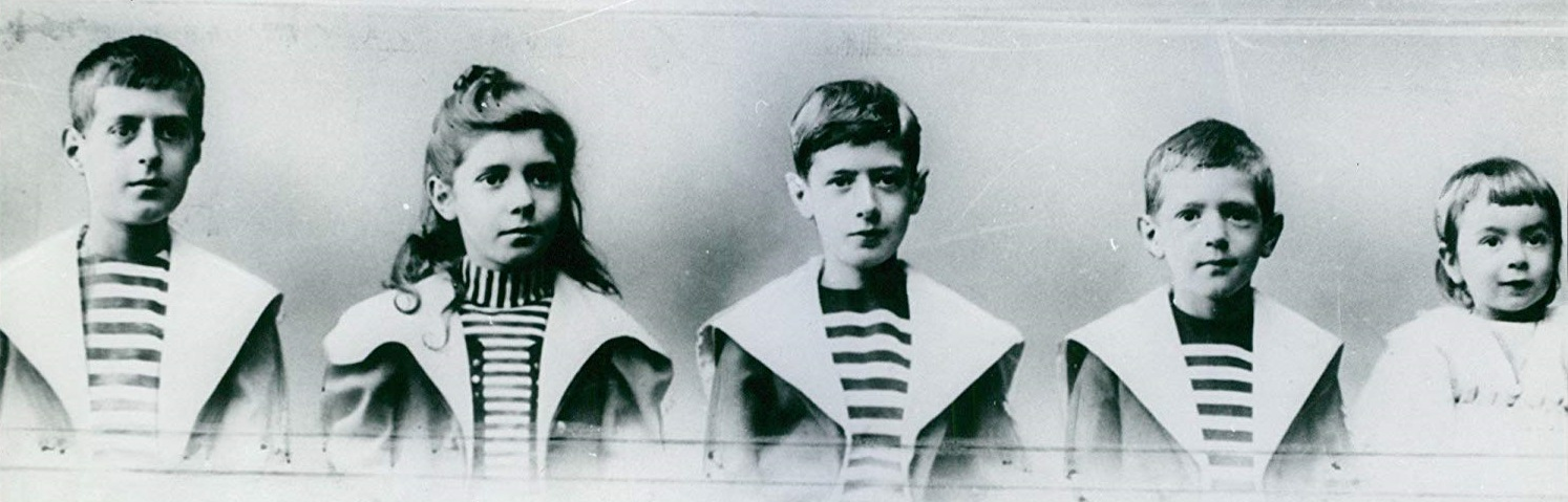 Les cinq enfants d'Henri de Gaulle et Jeanne Maillot. De gauche à droite : Xavier, Marie-Agnès, Charles, Jacques et Pierre (vers 1899).